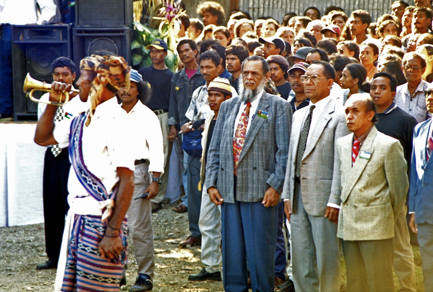 CNRT-Veranstaltung zum Unabhängigkeitsreferendum in Osttimor 1999 mit Manuel Carrascalao in Dili